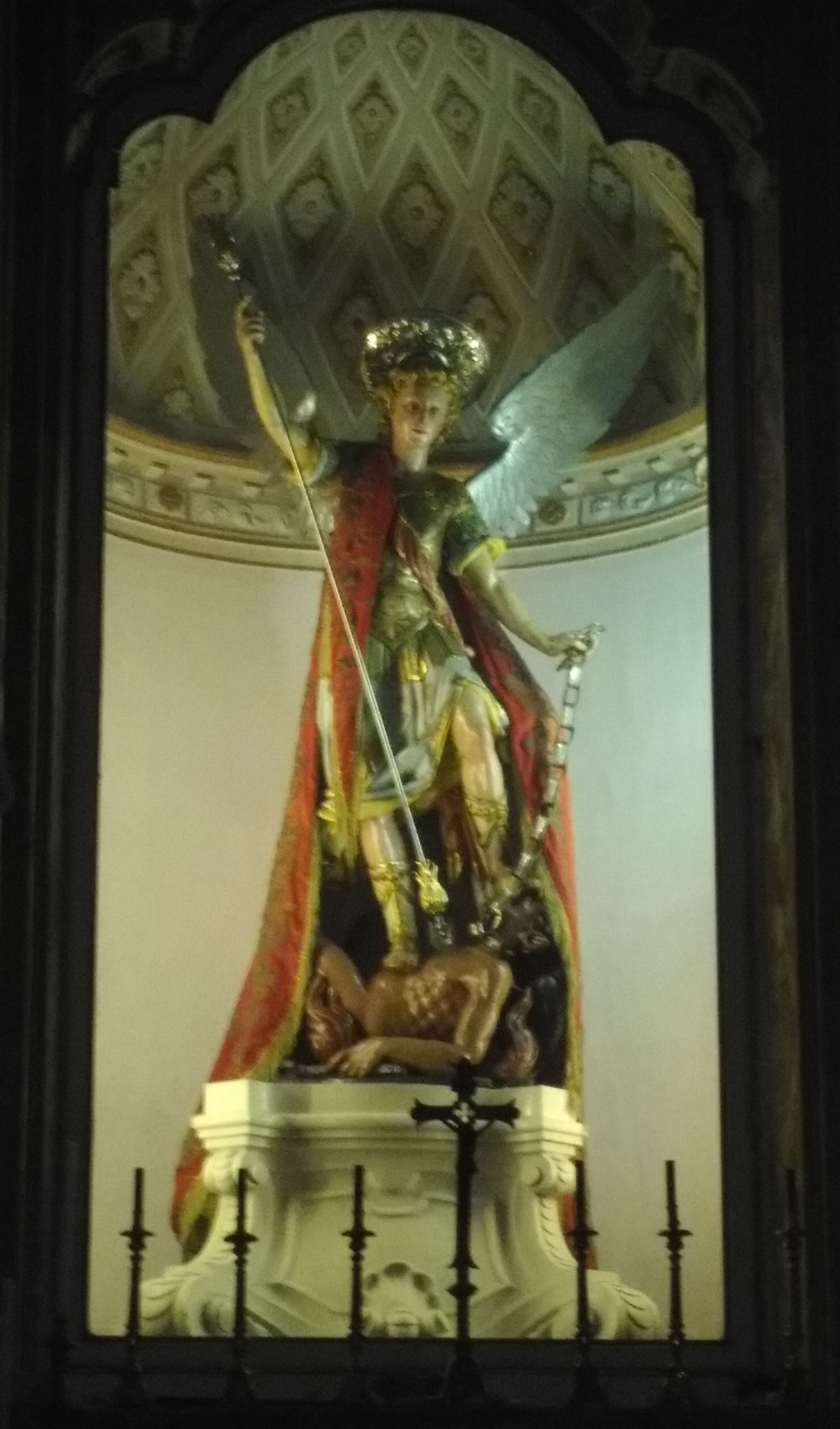 Statua lignea, opera di Stefano Li Volsi